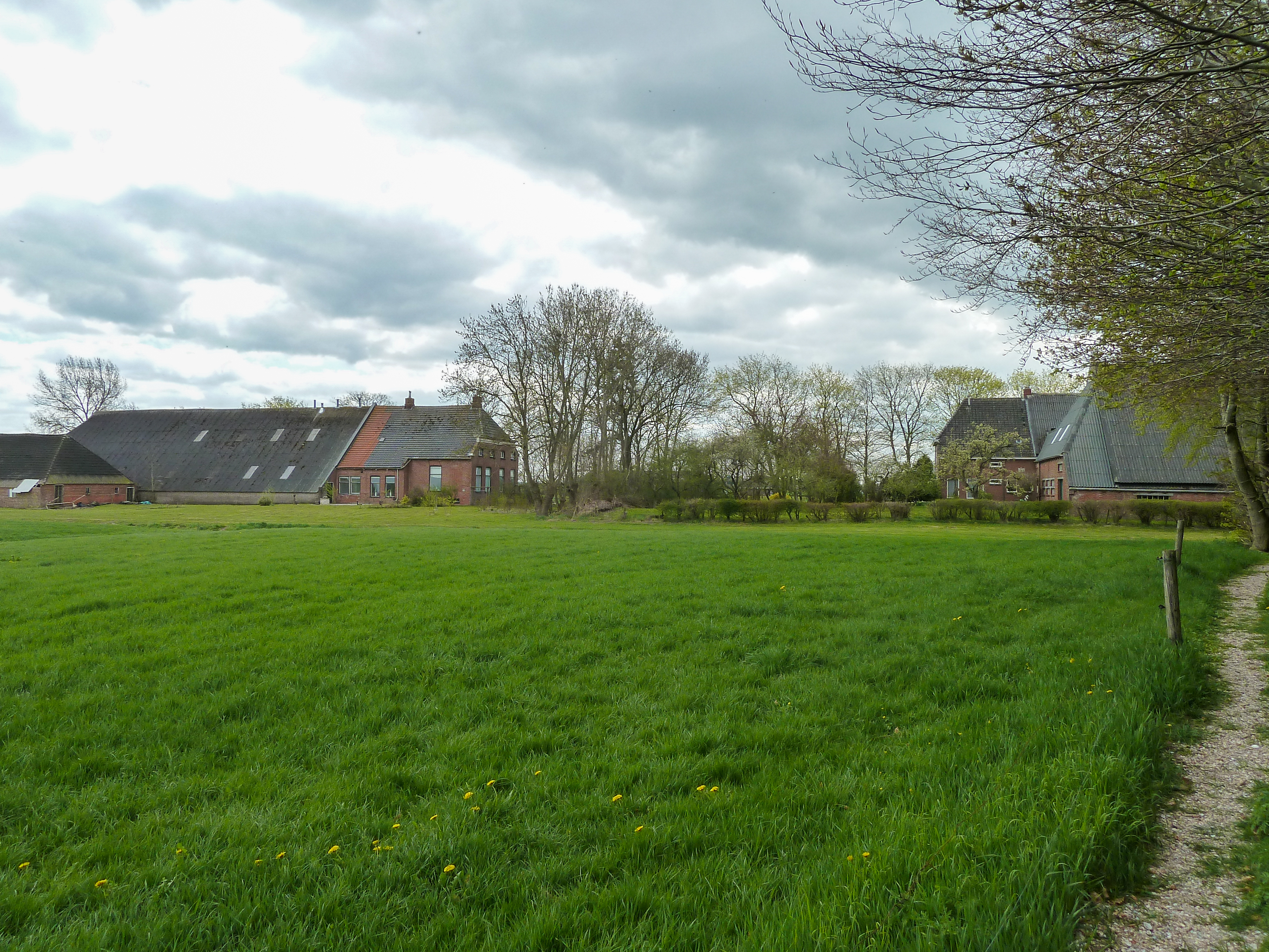 Pad rond de wierde van Wittewierum